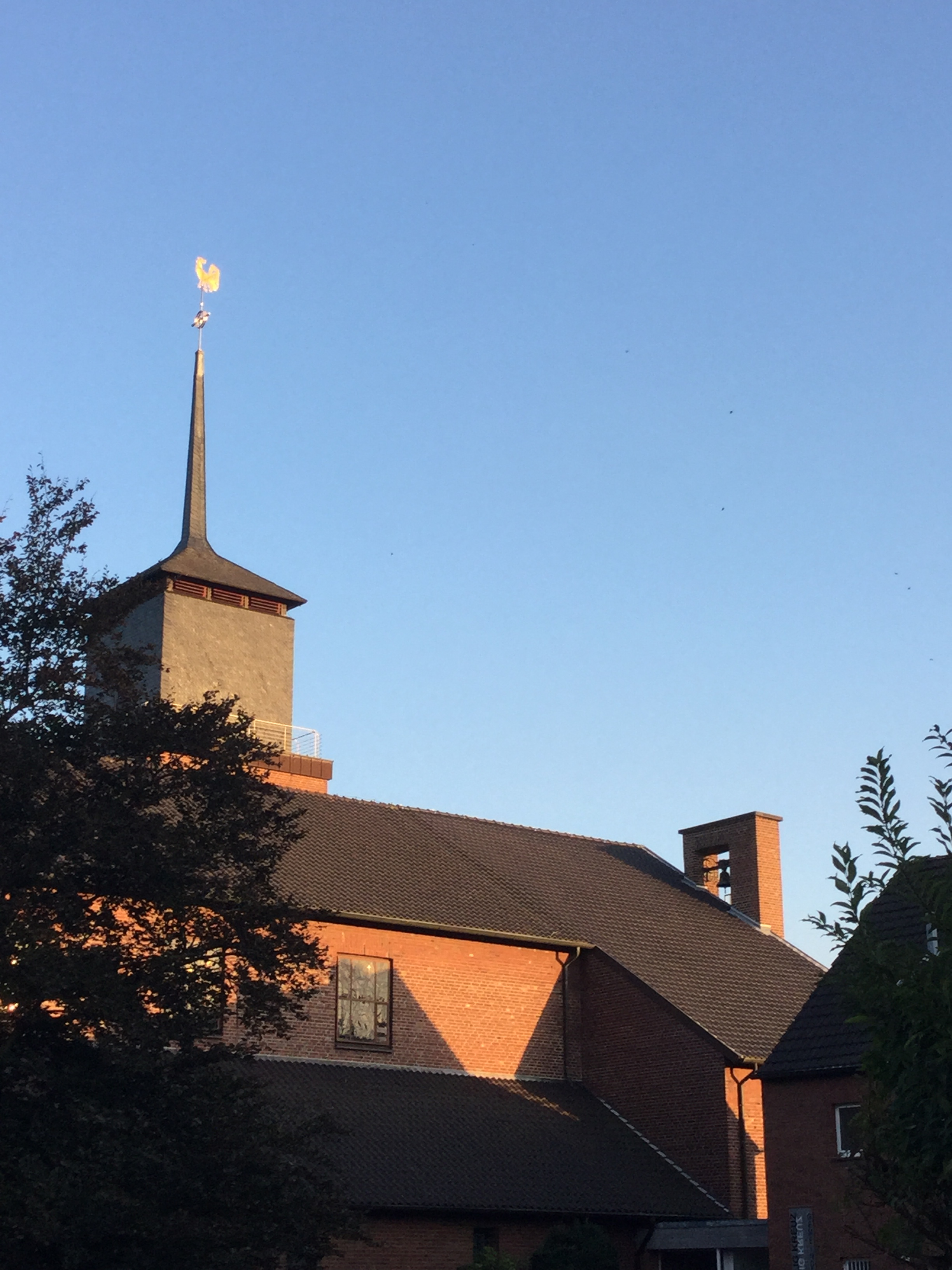 Nordansicht